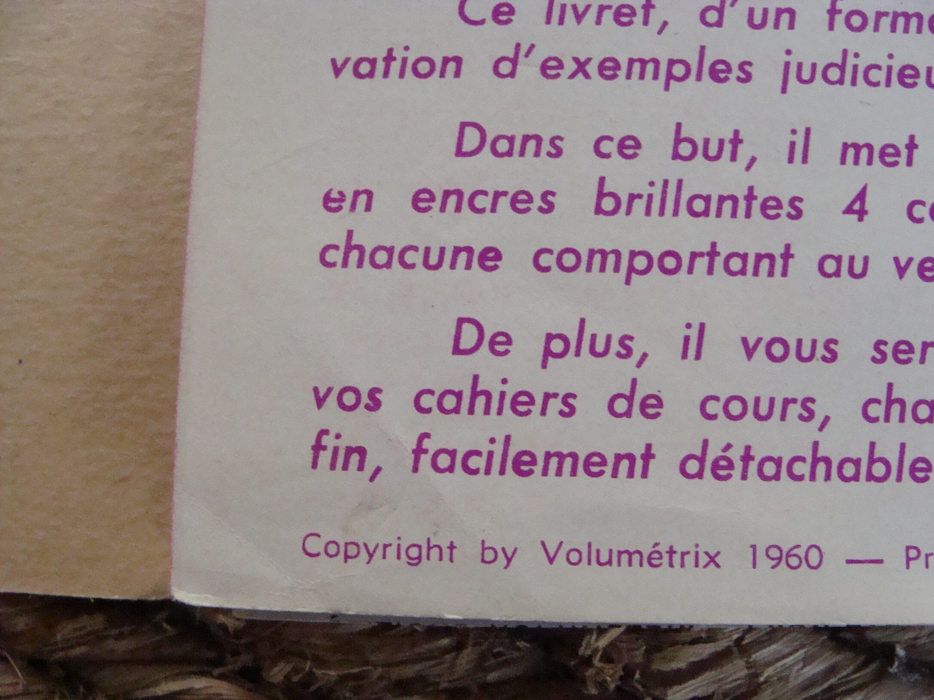 Il s'agit ici de démontrer les années de parution des livrets. Ici un des tous premiers livrets Volumétrix de 16 pages éditées en 1960